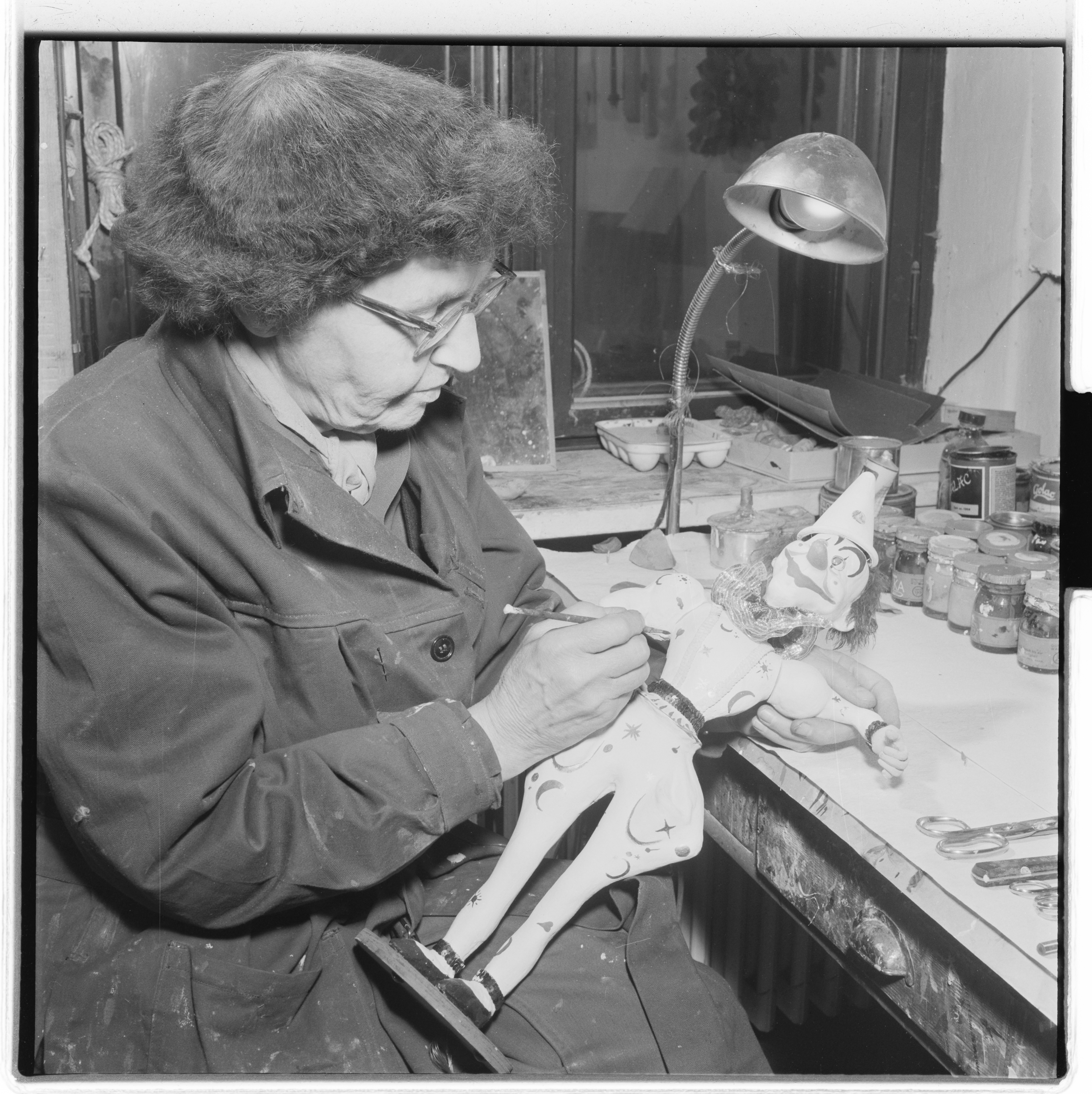 Bildet er hentet fra Arkivverket. Caprinofilm. NÅ nr.1, 1955 Arkivinstitusjon : Riksarkivet Arkivnavn : Billedbladet NÅ Sted : Norge, Ukjent, Ukjent, Ukjent Emneord: Rekvisitter, Dukkefilm, Menn, Kvinner, Innspilling Avbildet: Ivo Caprino